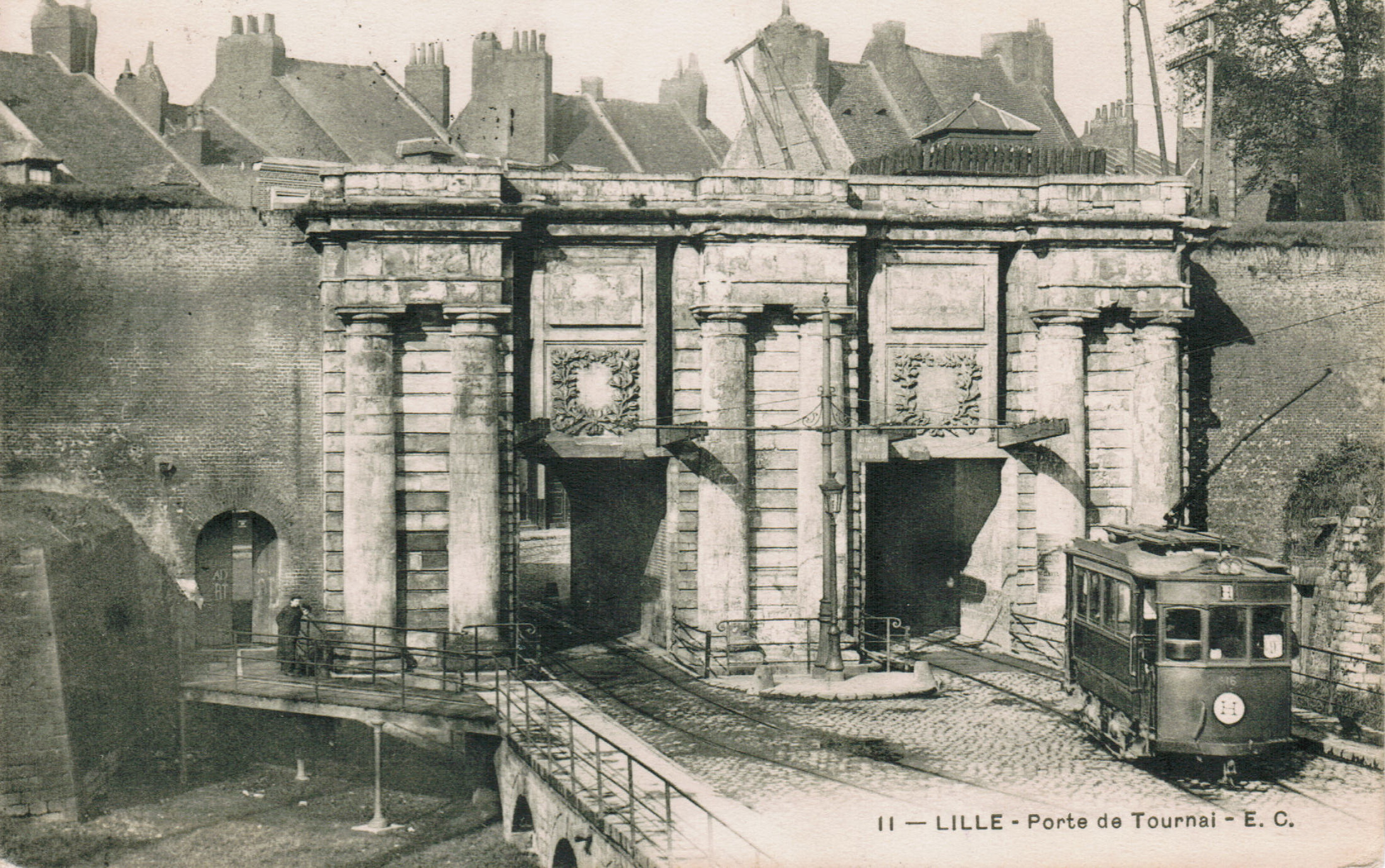 Carte postale ancienne éditée par EC, N°11LILLE : La Porte de TournaiVue en gros plan de la motrice de tramway n°616 sur la ligne H (sans doute de la La compagnie des tramways de Roubaix et de Tourcoing)